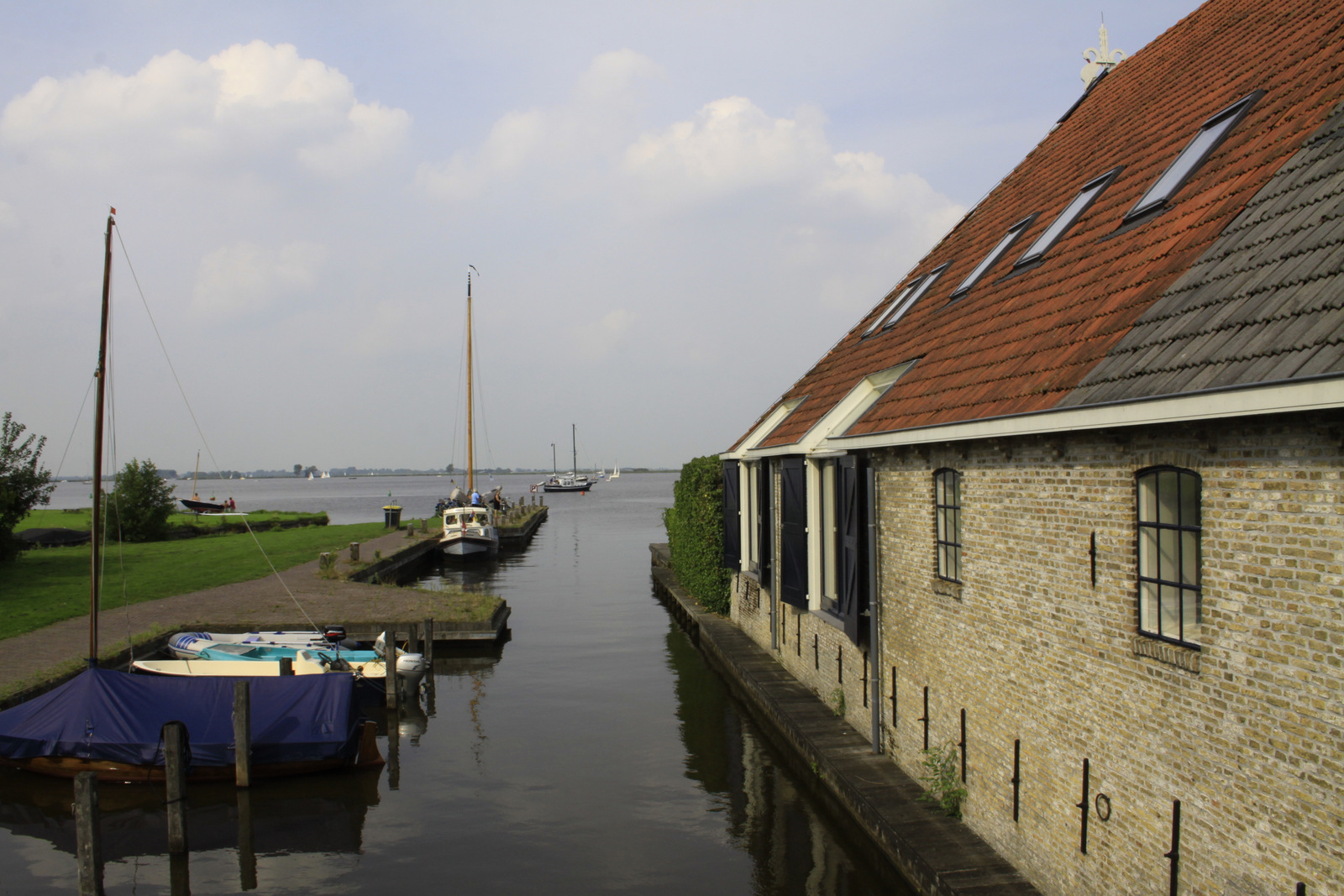 Doorkijkje naar de Langweerderwielen.